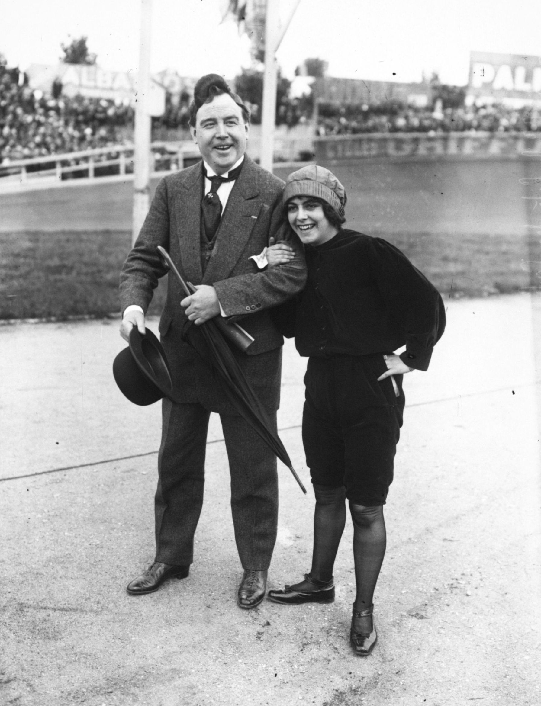 26-8-12, Buffalo, fête des Caf'Conc', Gaby de Morlay et Mayol : photographie de presse